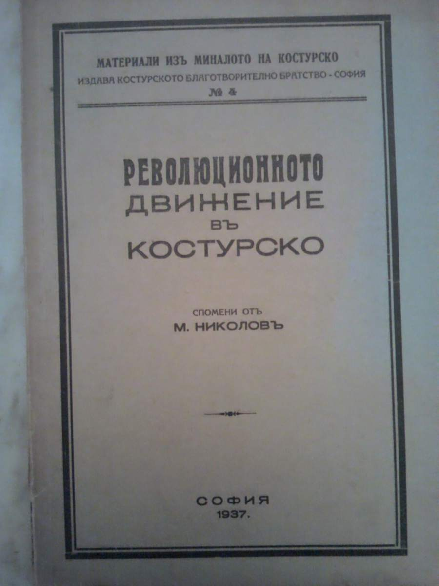 "Революционното движение в Костурско"